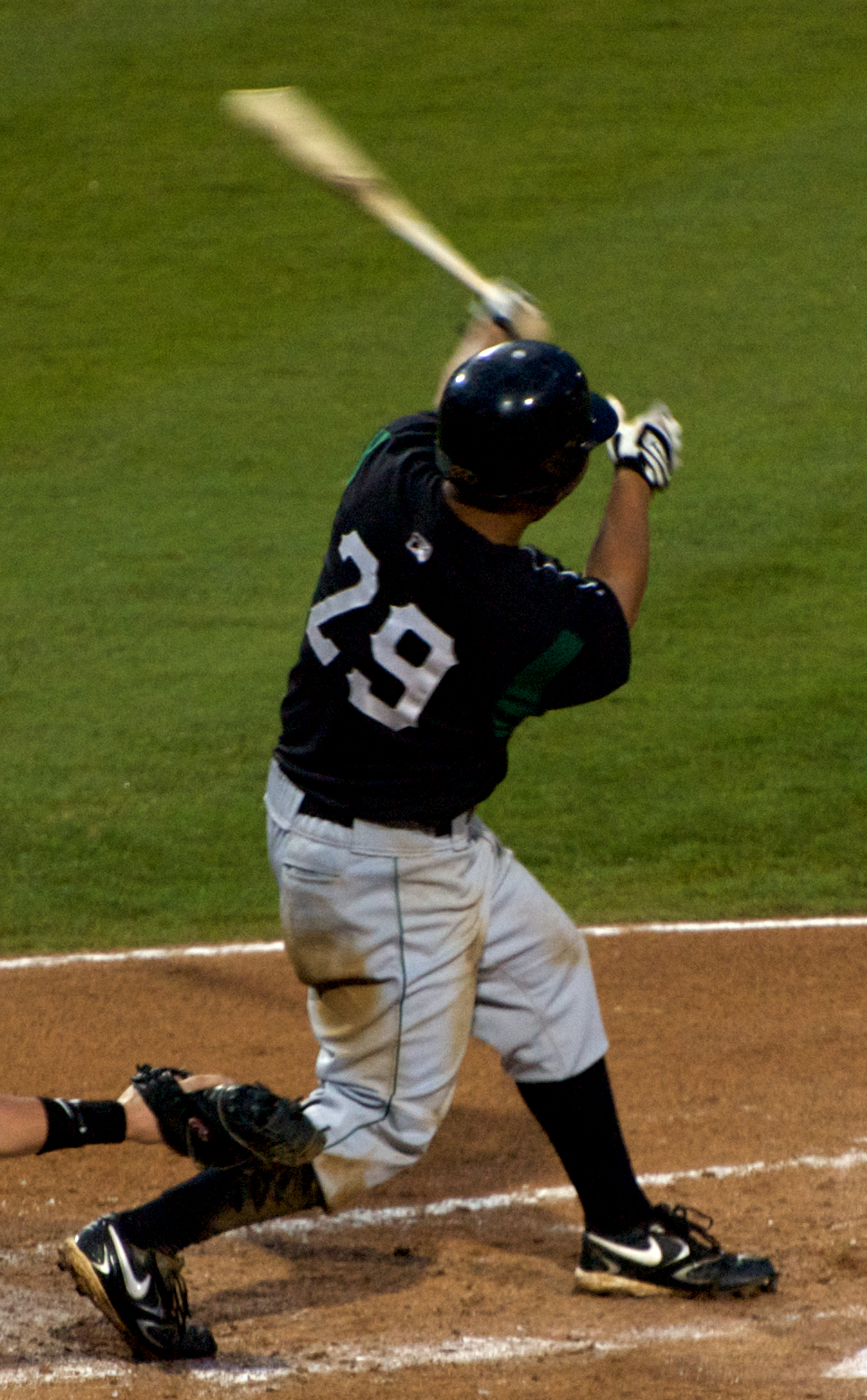 Ray Chang